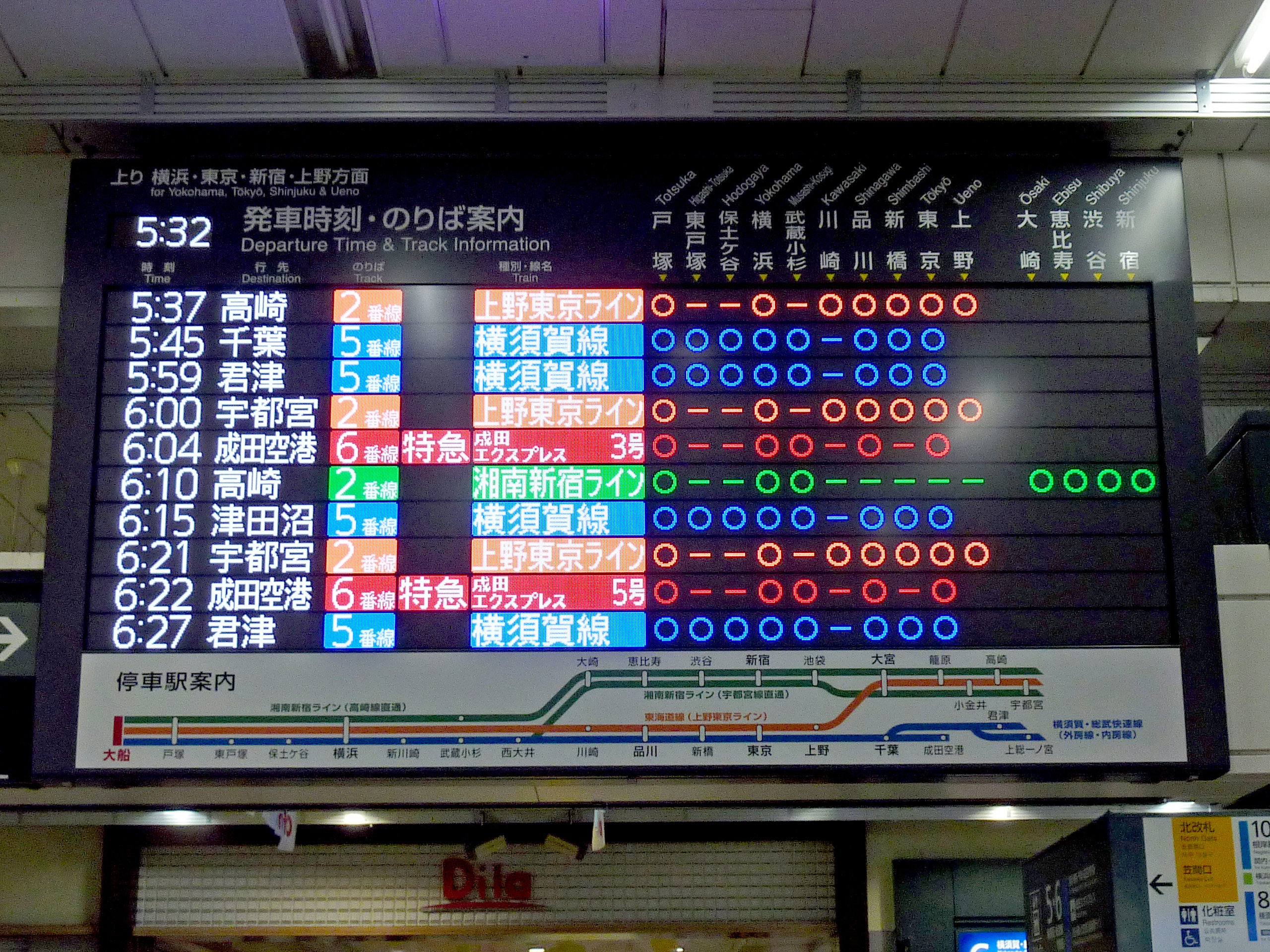 2016年よりフルカラー化された10段発車標。